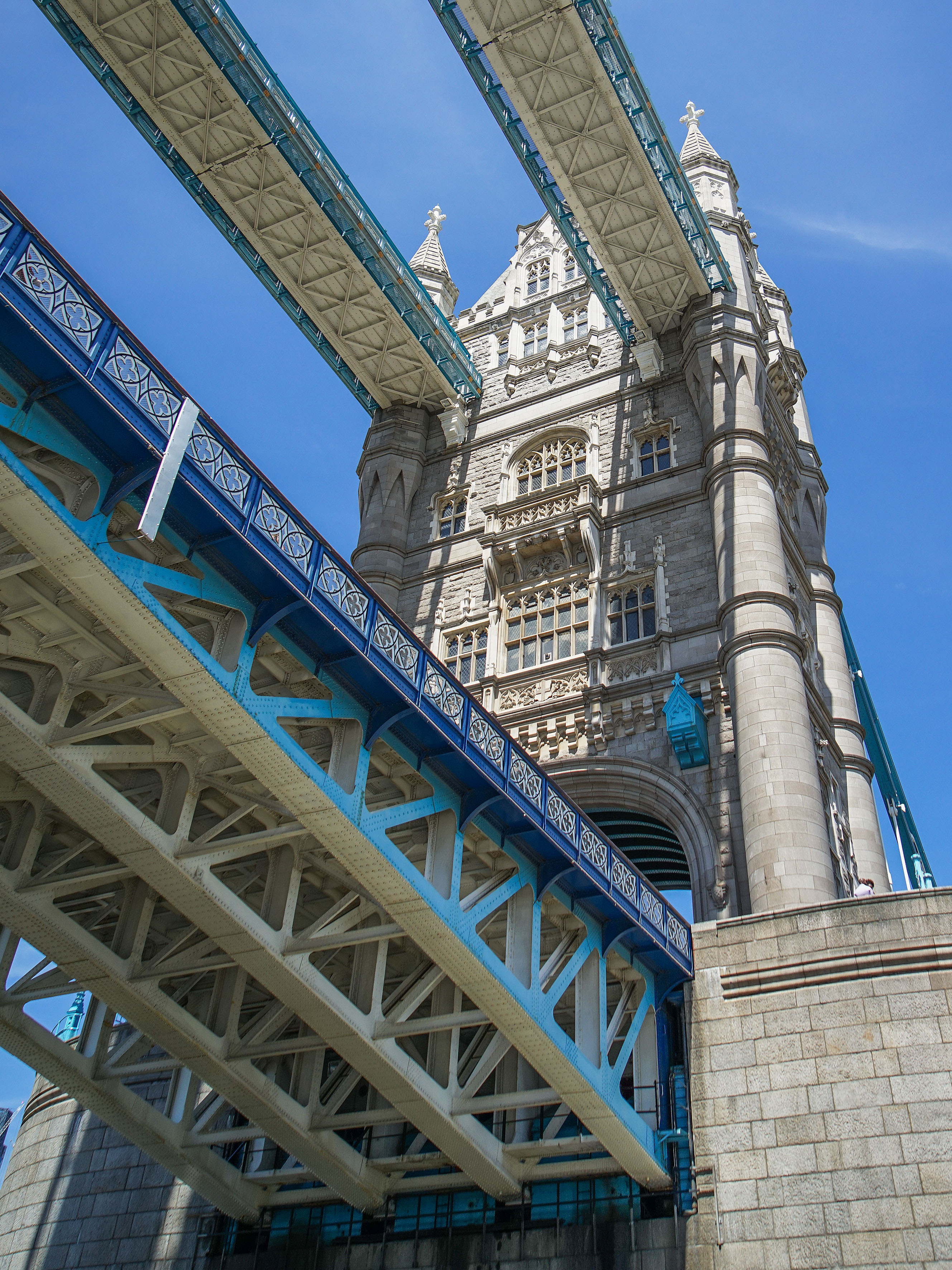 Der Nordturm von der Themse aus gesehen